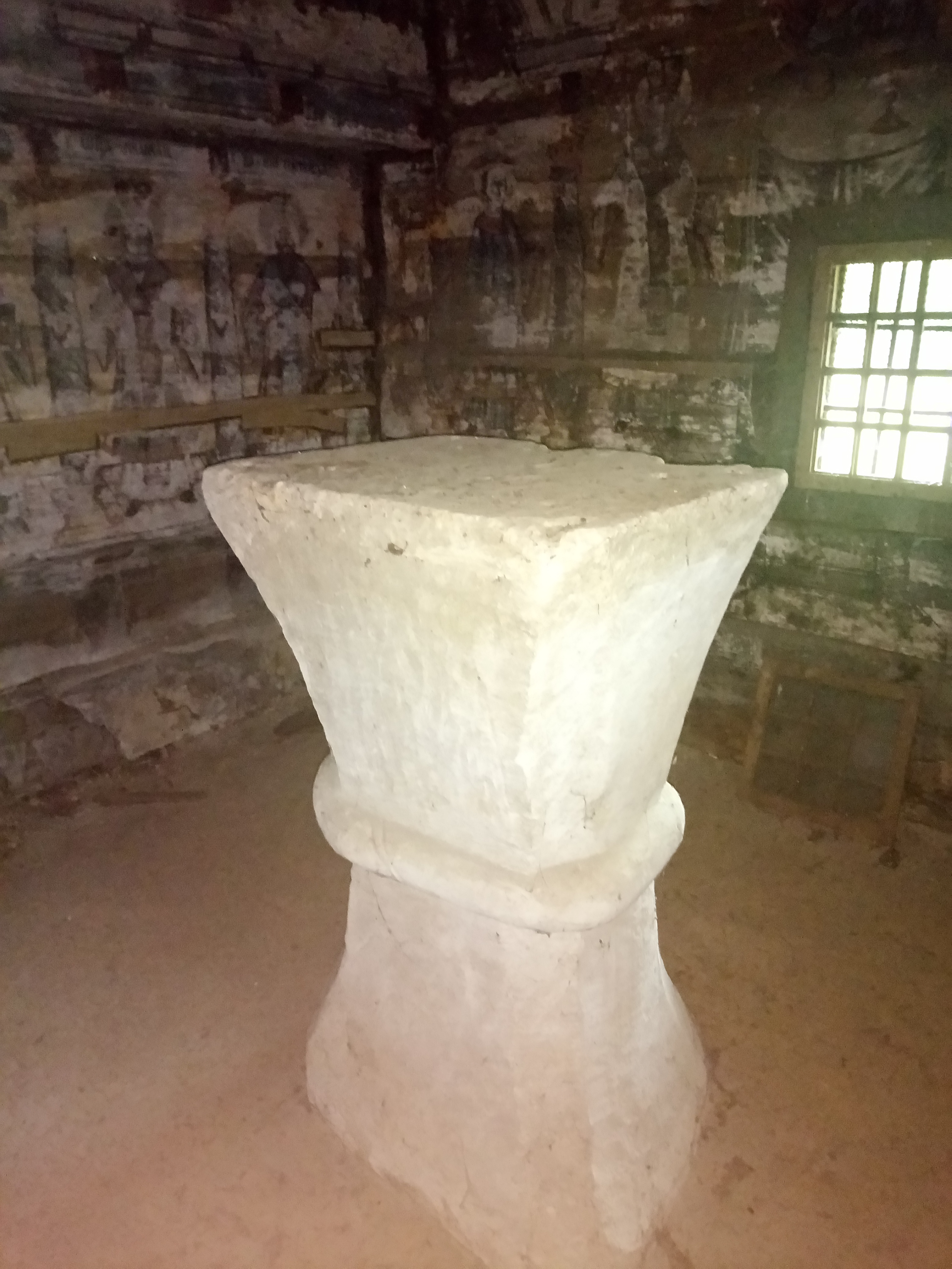 фотографія престолу в церкві